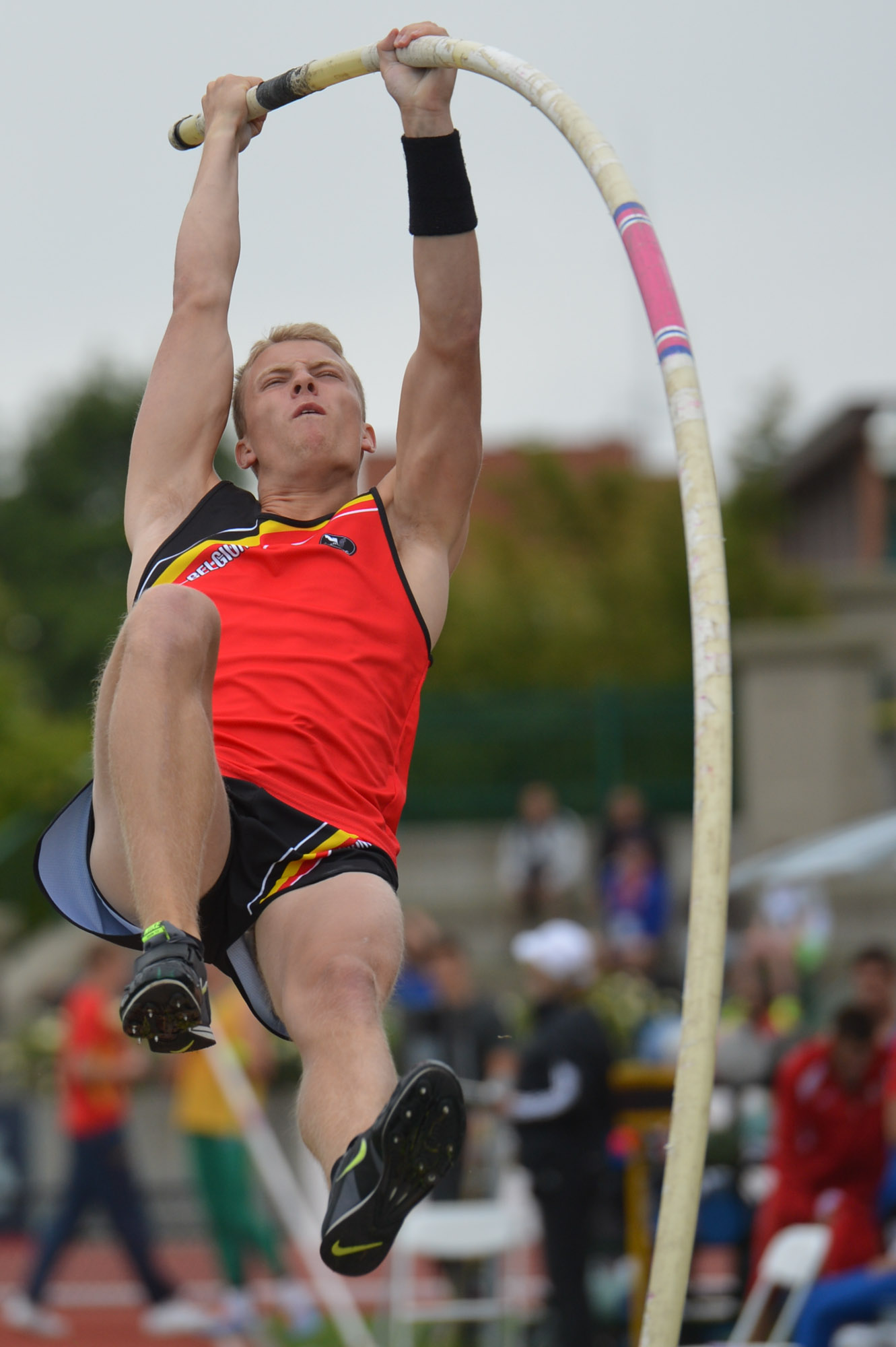 Ben Broeders in actie tijdens de WK voor junioren in 2014.